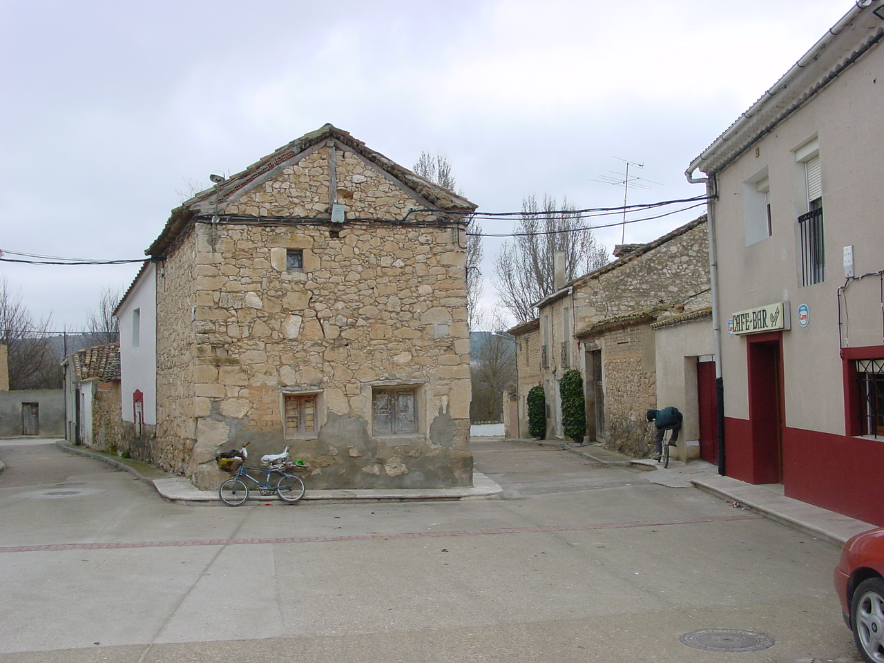 Valbuena de Duero, provincia de Valladolid (España).